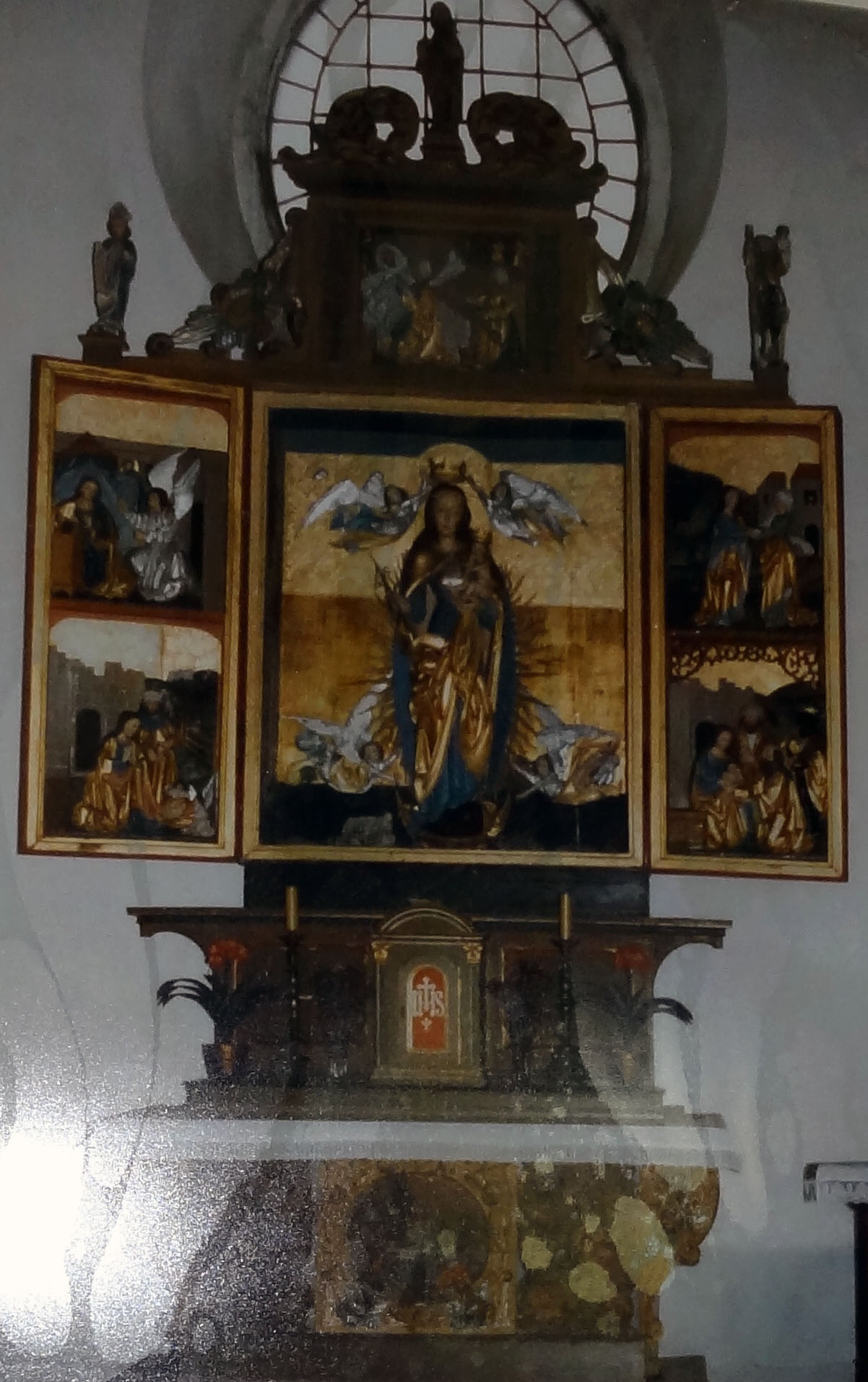 Marienbild mit Altar aus der Fürstenauer Kirche jetzt im Museeum der Diezöne Litomerice